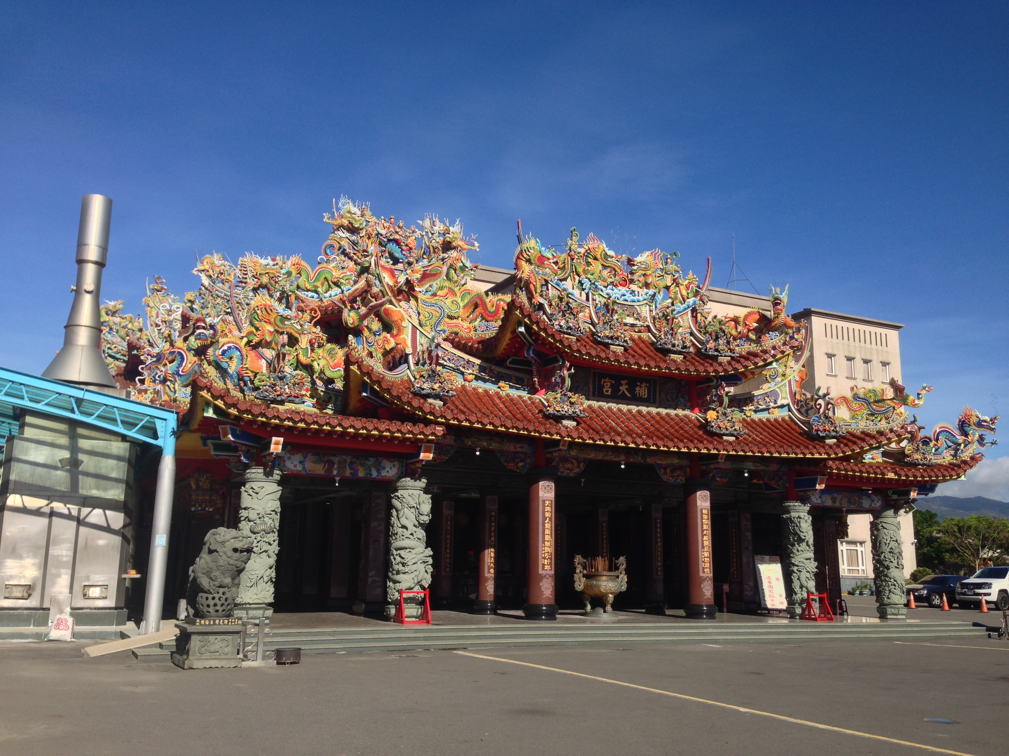 補天宮斜照